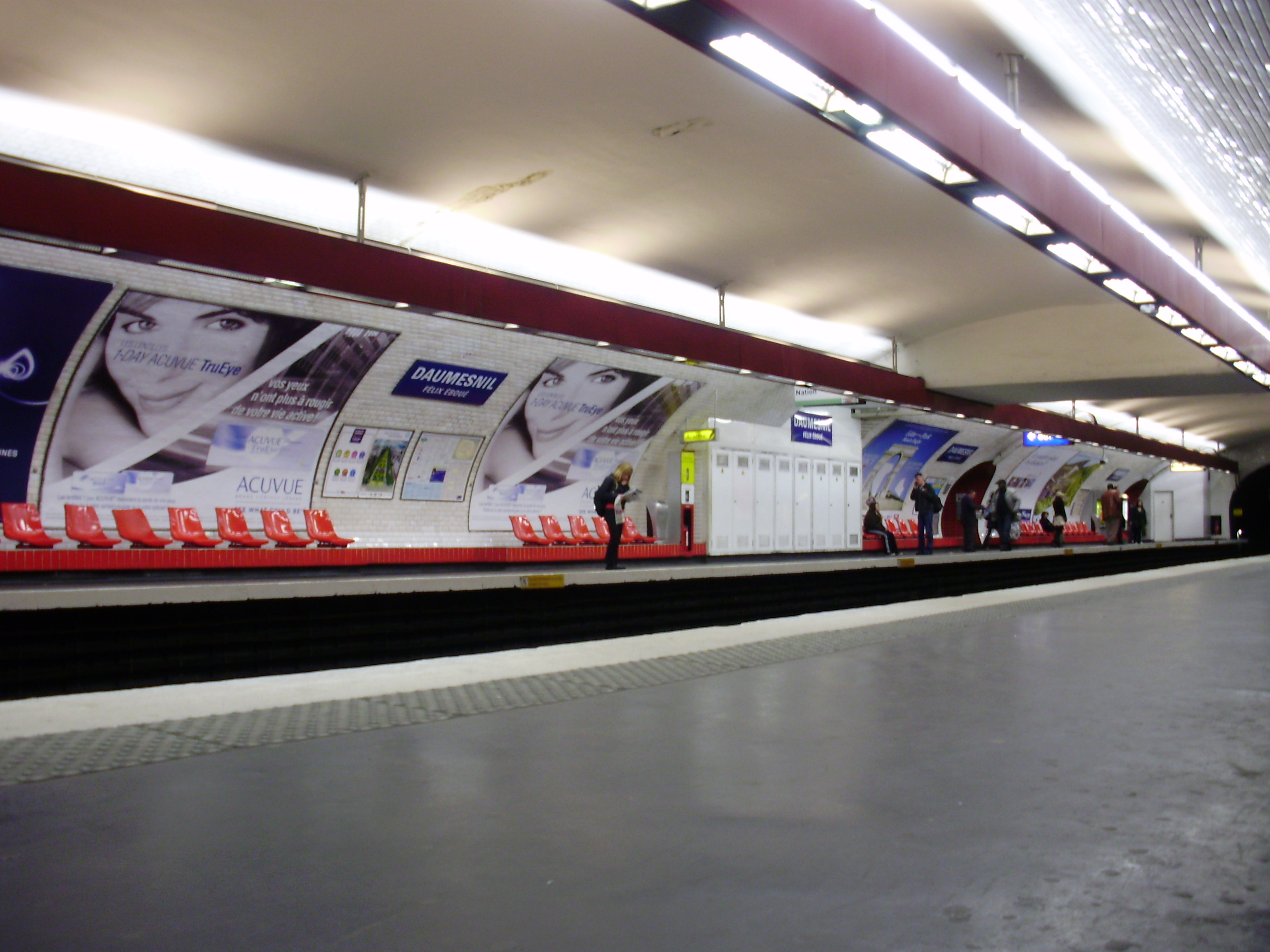 Quai vers Nation (ligne 6) de la station « Daumesnil » du métro de Paris